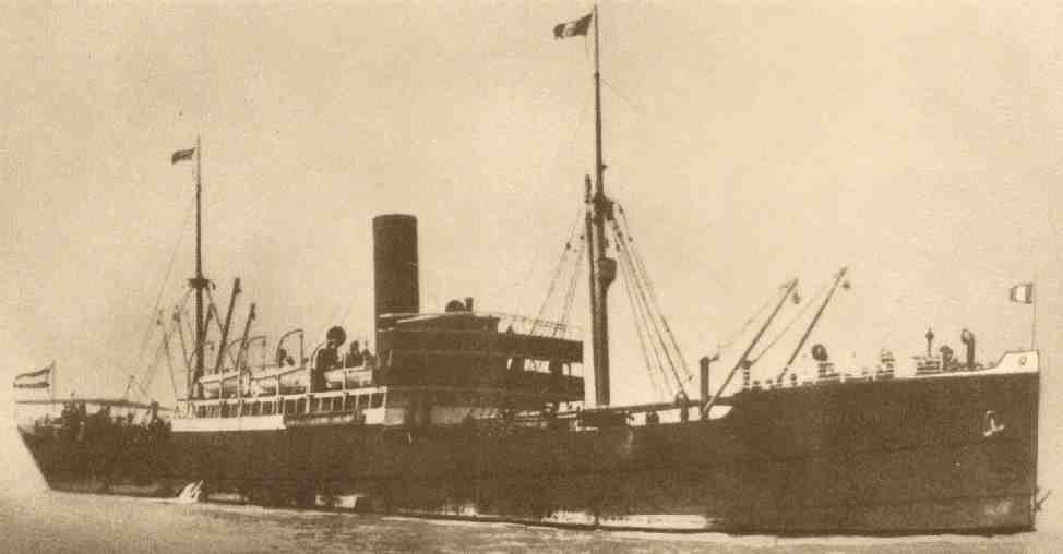 Der Dampfer ATHESIA der Hapag, später UARDA im Kosmos-Dienst